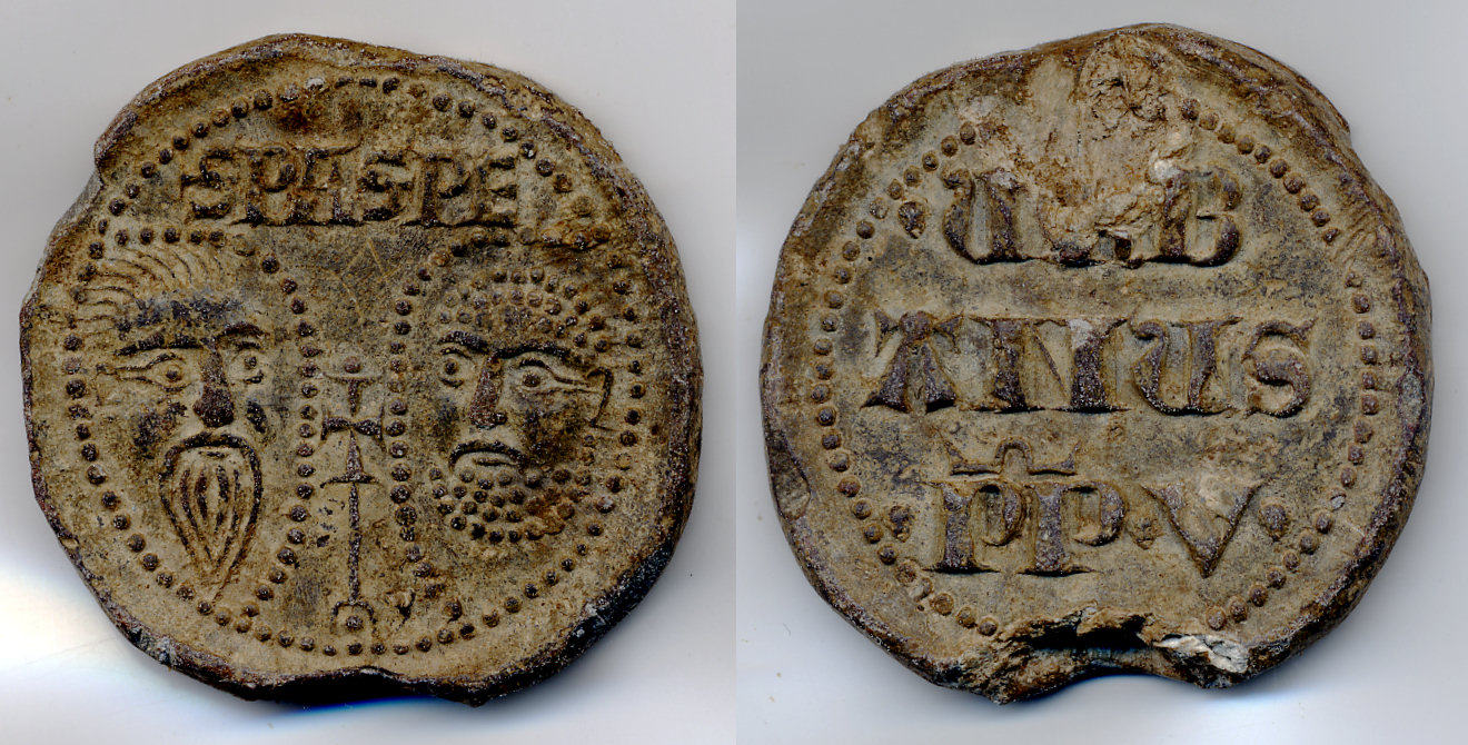 Sceau de plomb ou bulle du Pape Urbain V (1362-1370), diamètre 40 mm, épaisseur 6 mm, poids 57 g